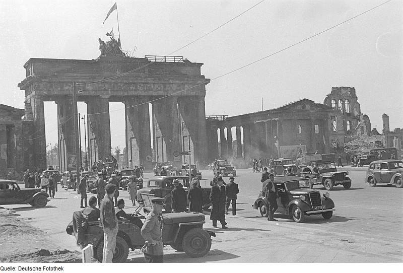 Original image description from the Deutsche FotothekUnkopiert